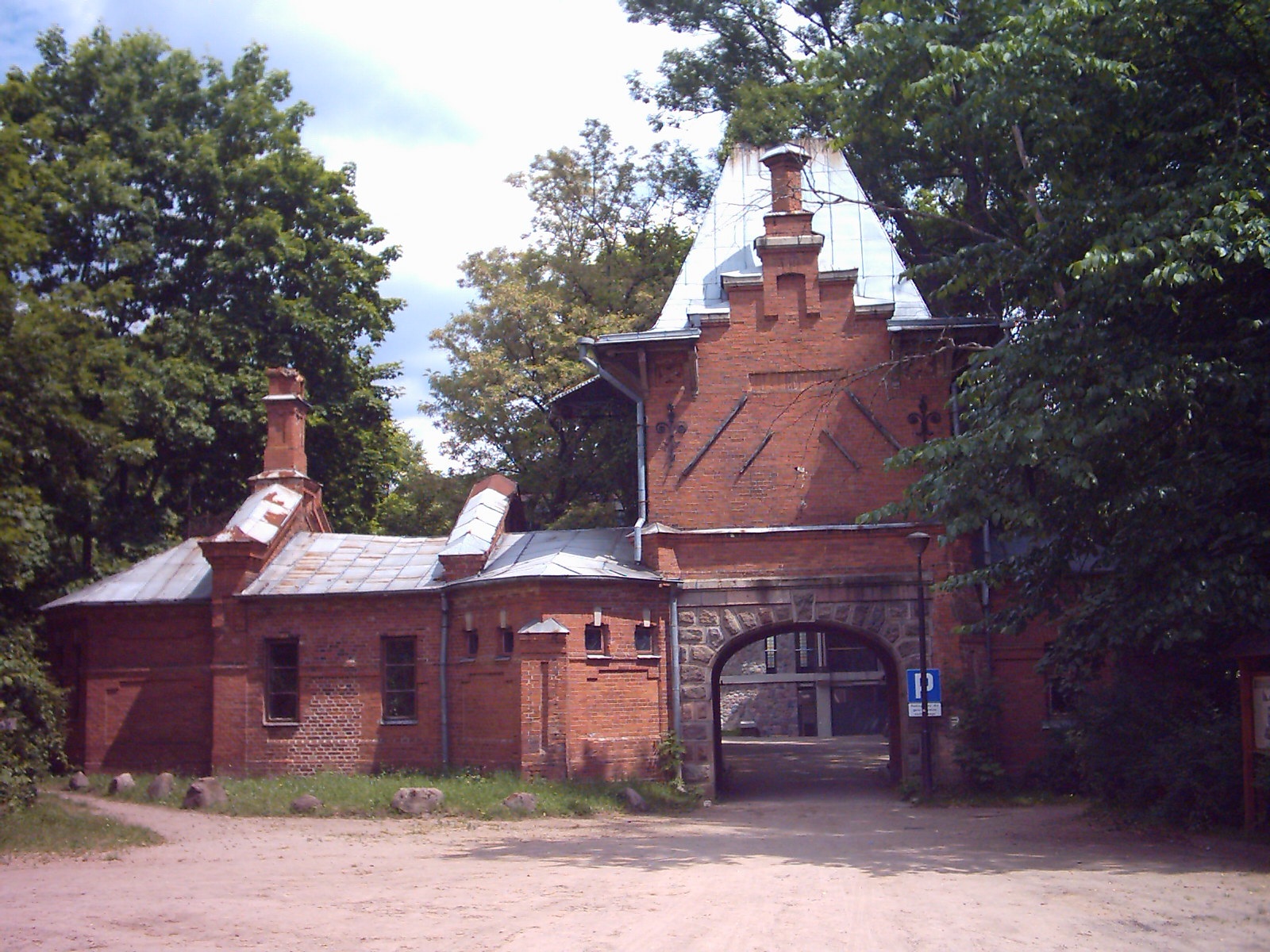 Brama pałacowa, pozostałość po pałacu carskim w Białowieży. Mieściła się w niej wartownia i zbrojownia. Od maja 2009 roku w pomieszczeniach funkcjonuje tu prywatna "Galeria w Bramie Carskiej". 10.1981.